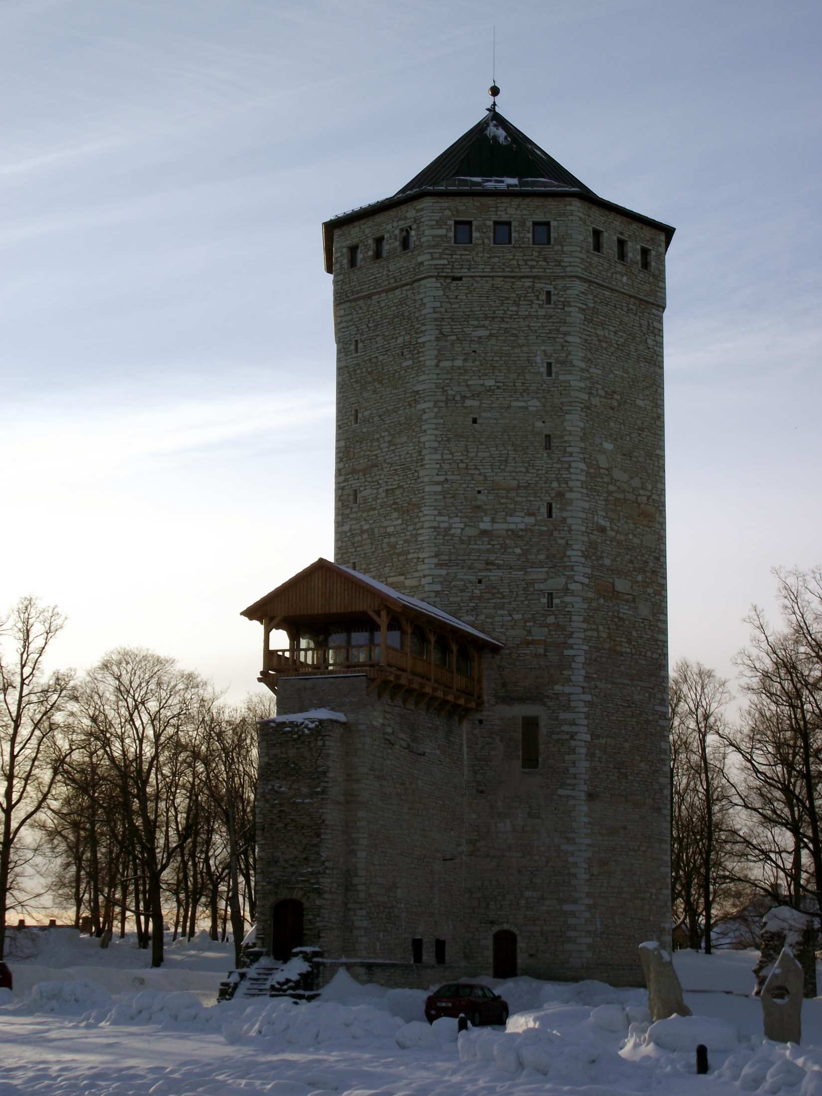 Paide Vallitorn